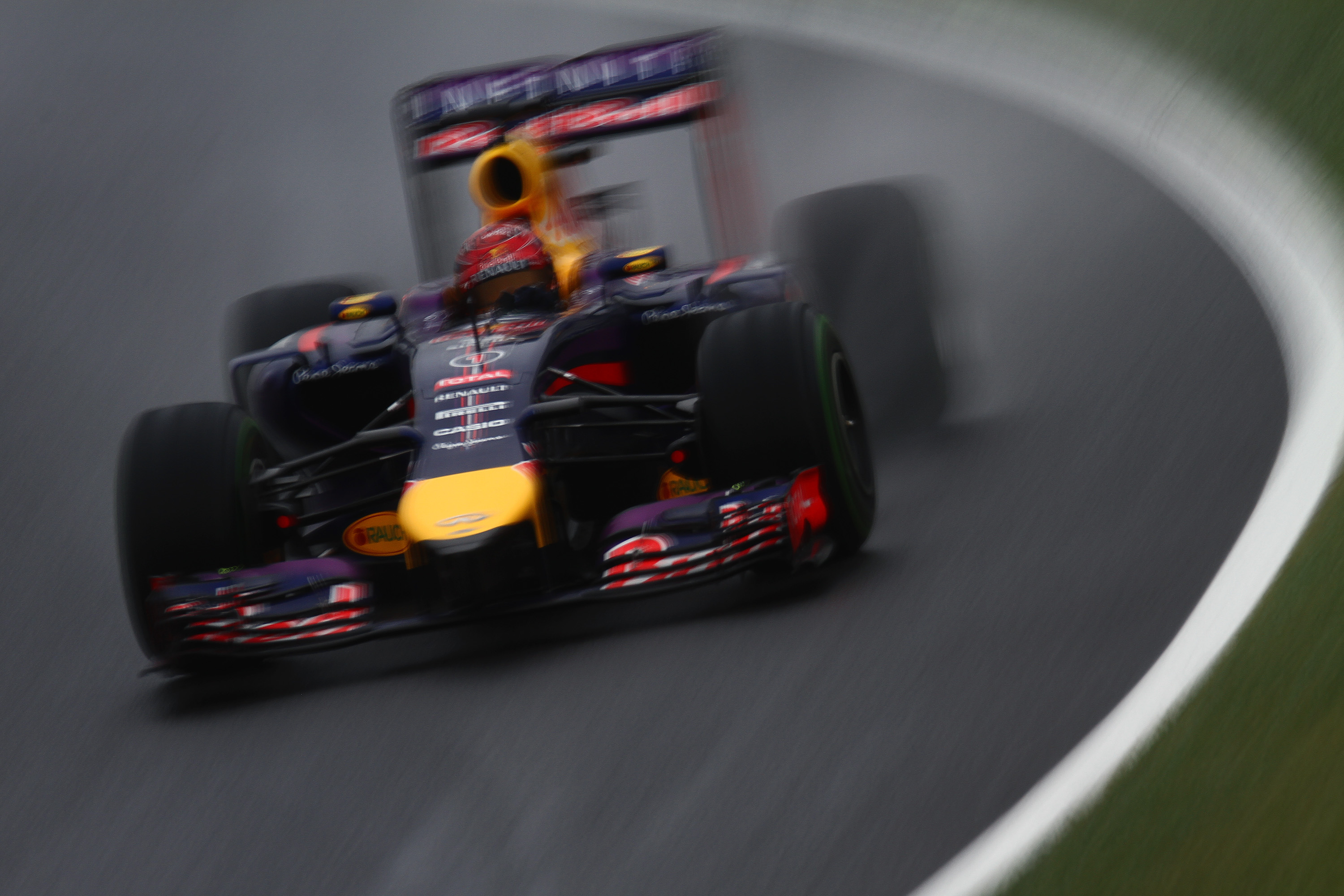 2014.10.5 F1 Rd.15 Suzuka Final, Infiniti Red Bull Racing (RB10) 1 セバスチャン・ベッテル [IMG_6904ks]